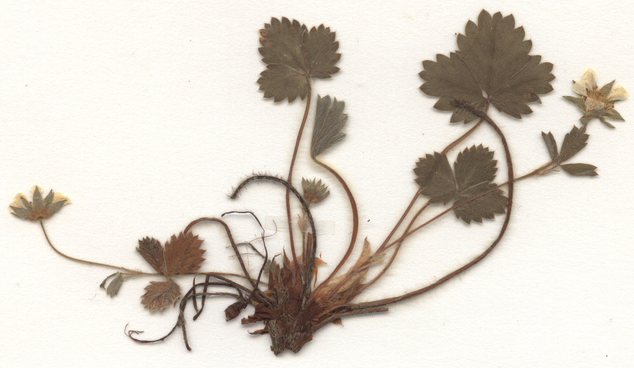 Potentilla sterilis, eigener Herbarbeleg von 1986, Unterfranken